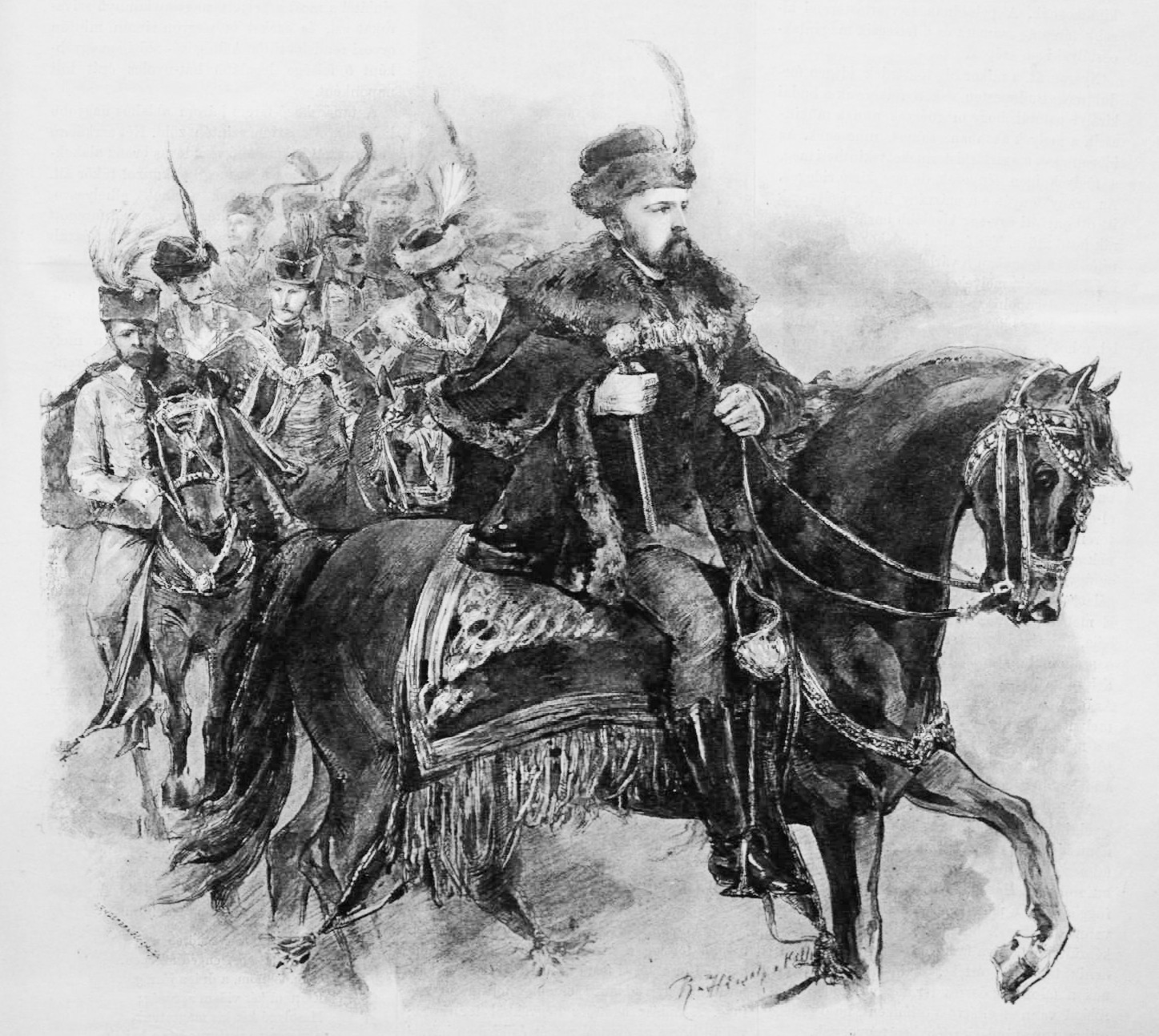 gróf Károlyi István (1797–1881) a díszbandérium élén Ferenc József koronázásakor. Radóné Hirsch Nelly rajza